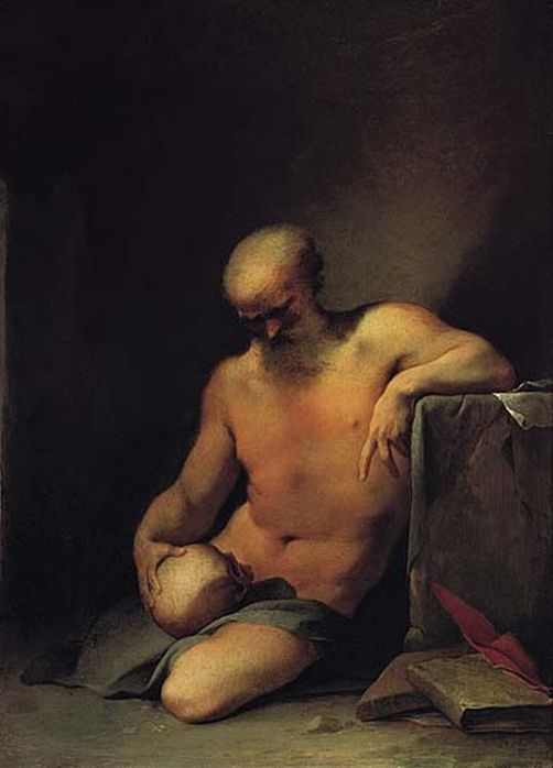 Saint Jerome